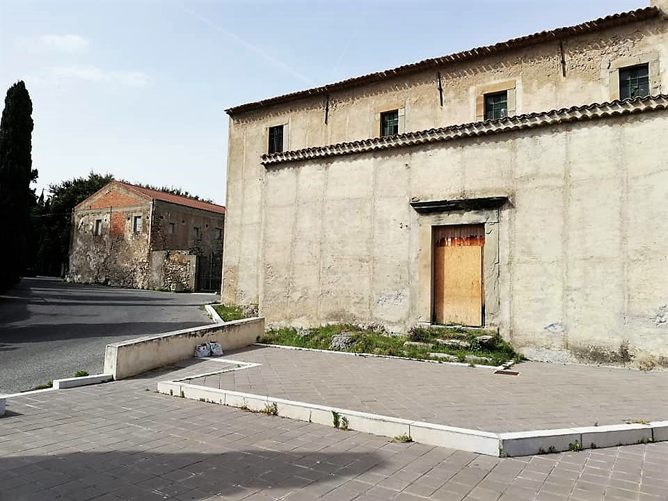 Chiesa di Santa Maria dell'Itria e convento dei Cappuccini.